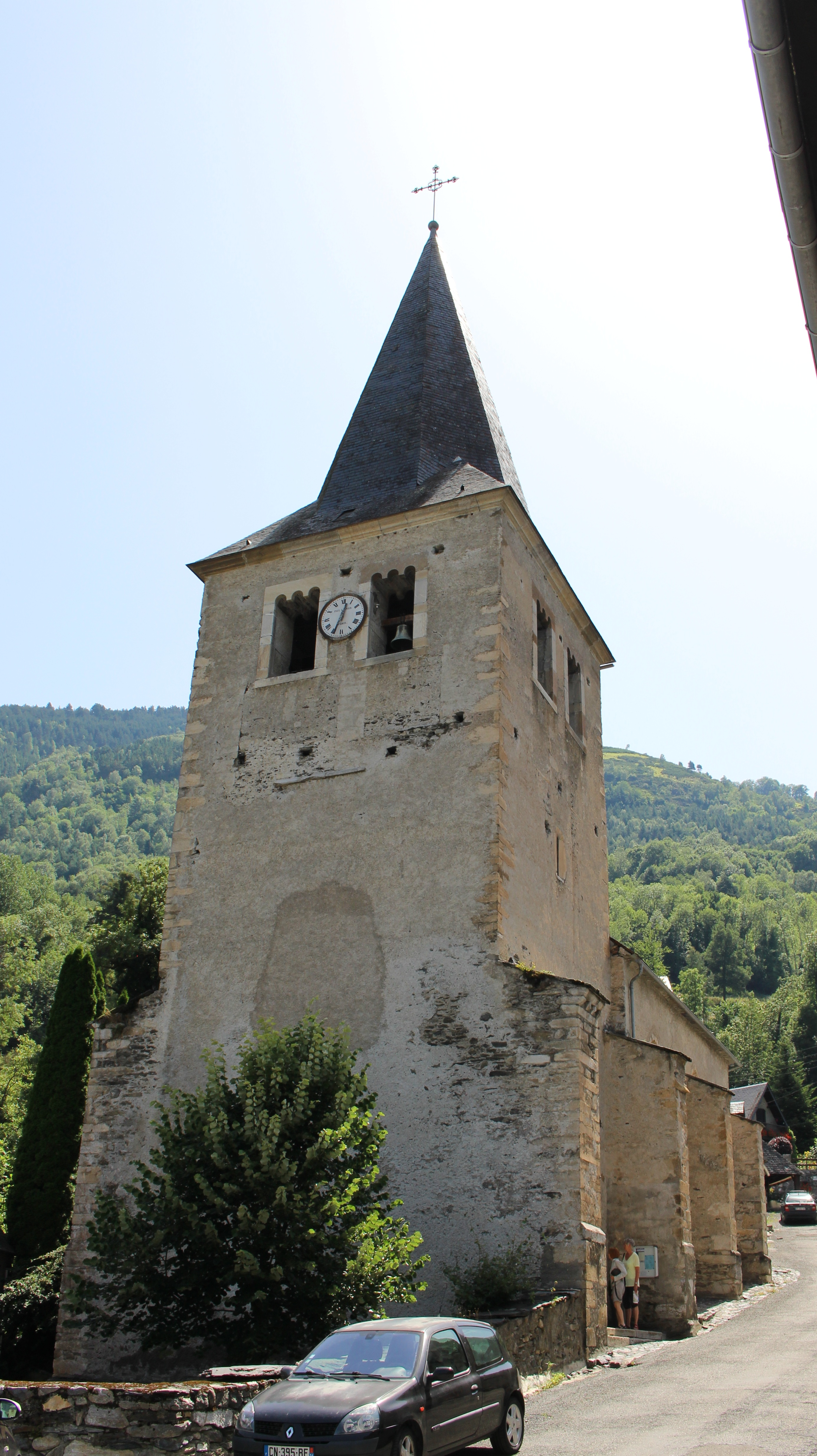 Église Notre-Dame de Bourisp (Hautes-Pyrénées)